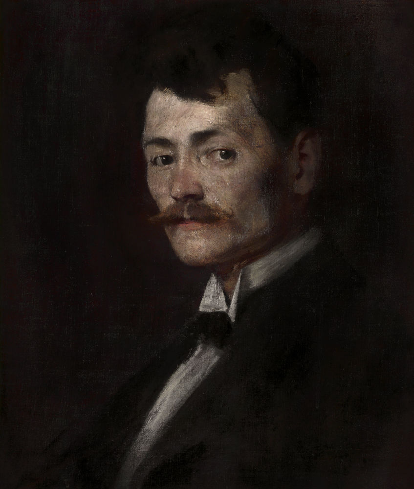 Portrait d'A. Marzolff par E. Schneider (MAMCS).